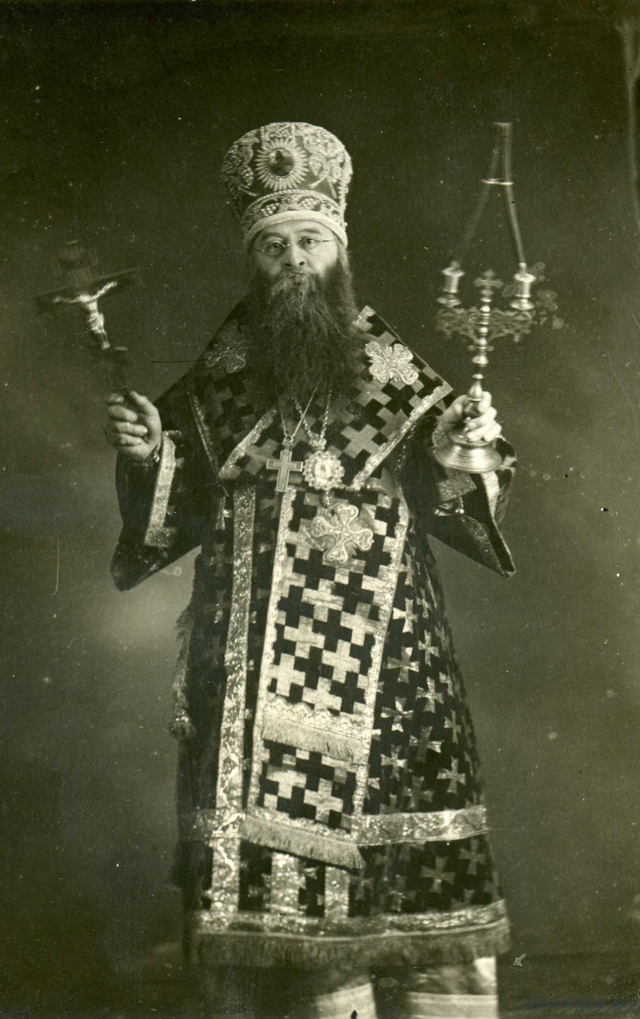 епископ Сергий (Страгородский)